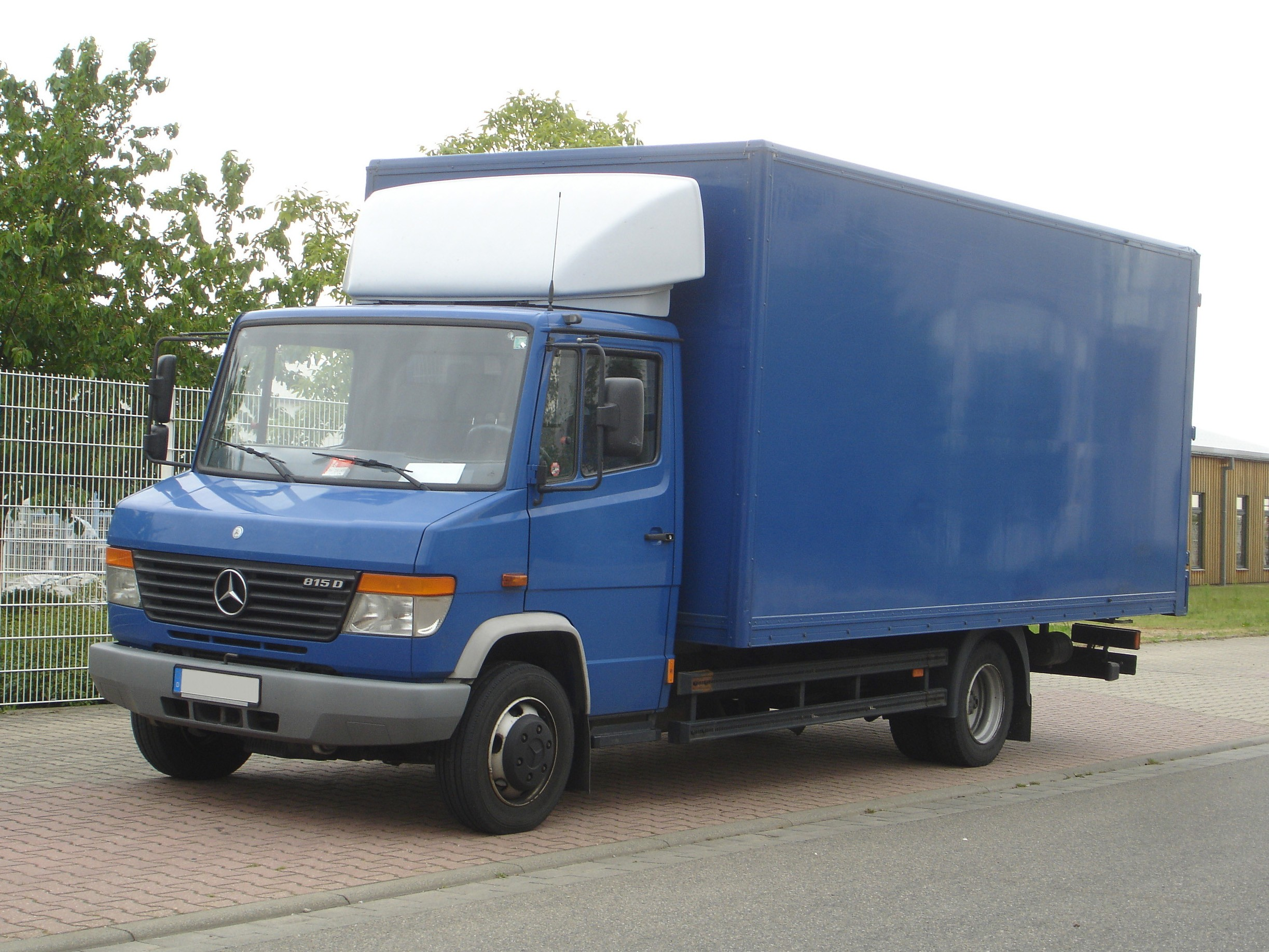 Mercedes Vario 815D Koffer-Lkw